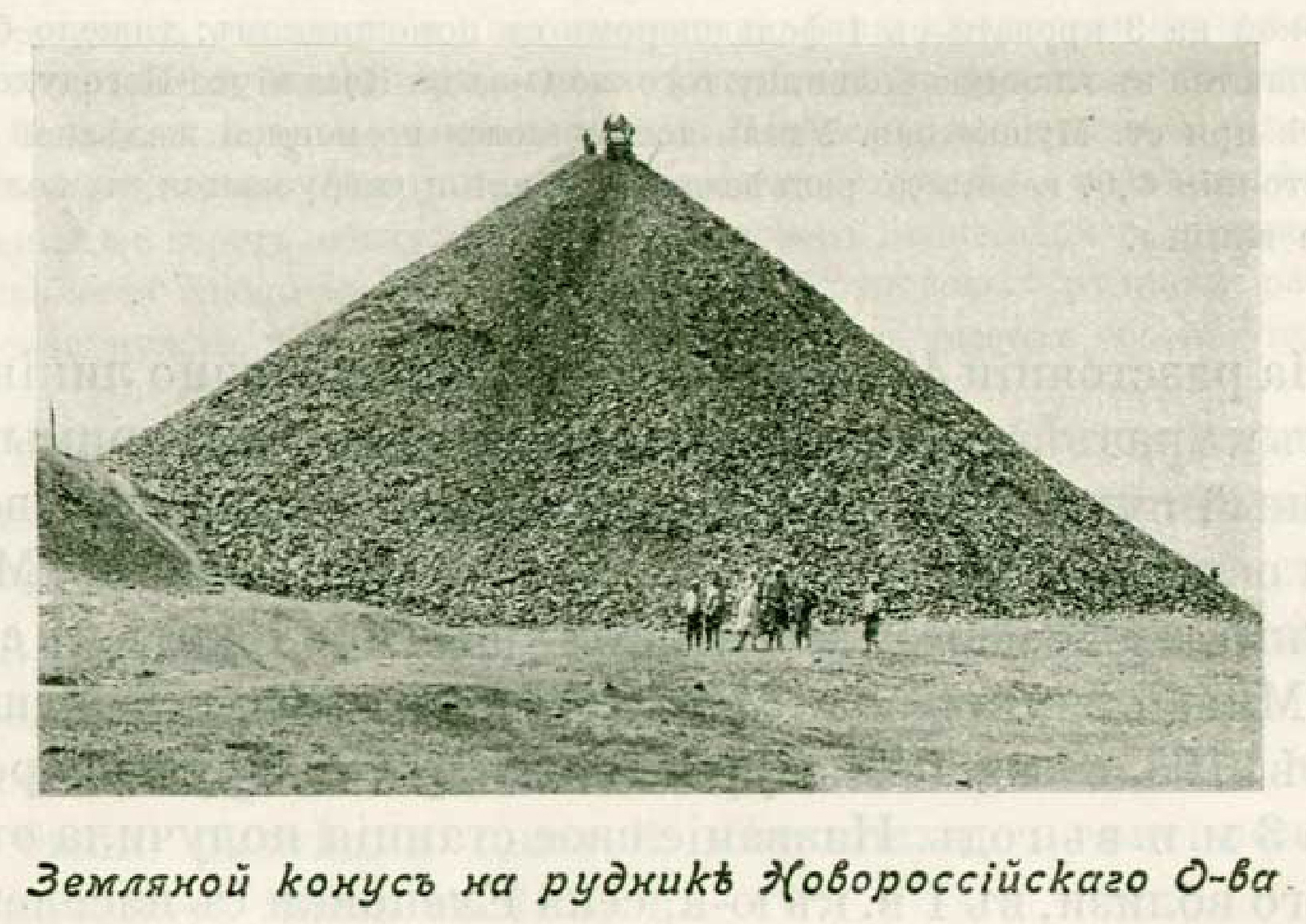 Земляной конус на руднике Новороссийского общества. Железный рудник (Новотроицкий или Каракубский) в районе сёл Еленовка и Александринское (Долынь Тарама)